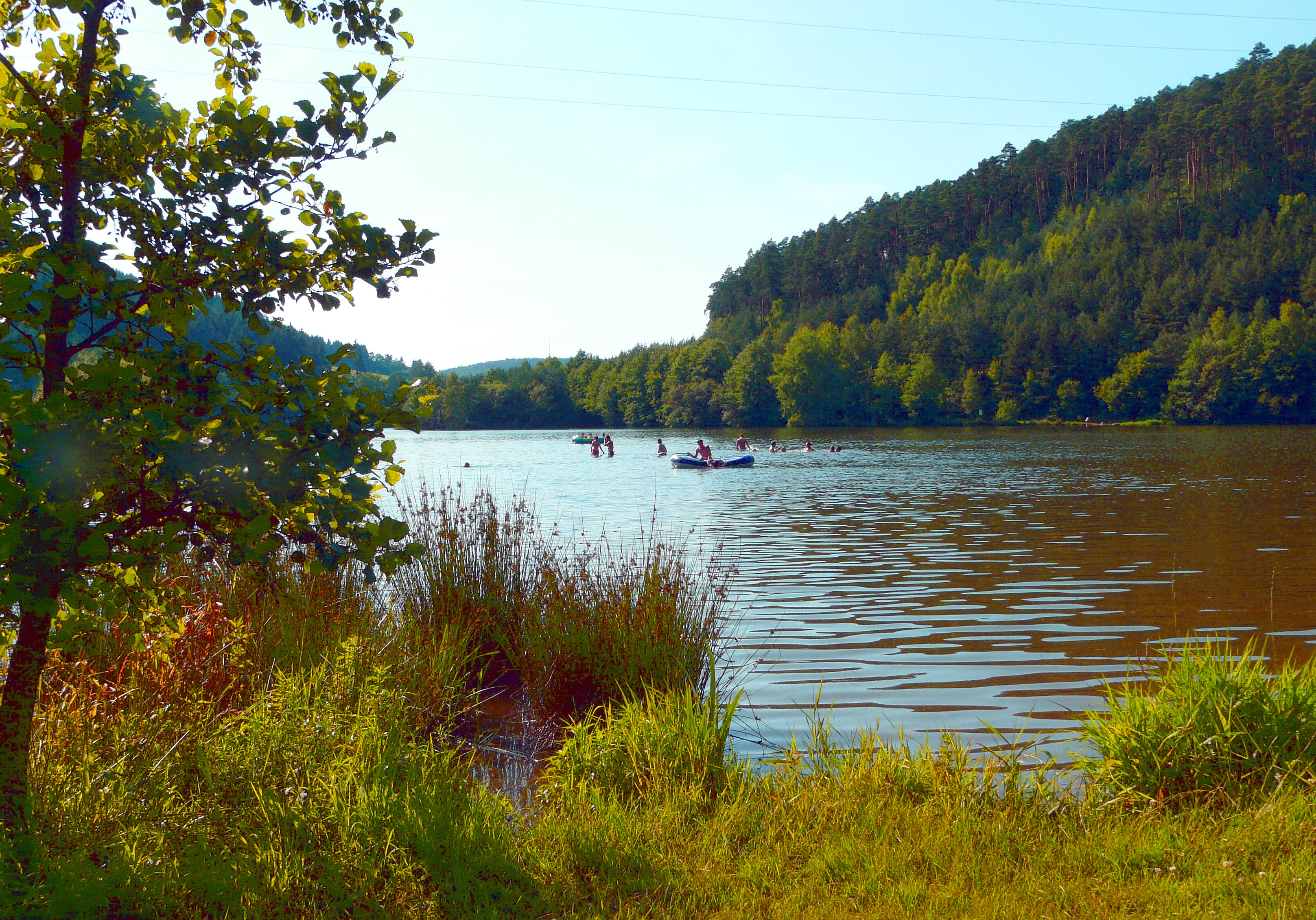 Stausee "Marbachsee" beim Weiler Marbach, zum Erbacher Stadtteil Haisterbach gehörend; Anziehungspunkt für Badefreunde und Wassersportler